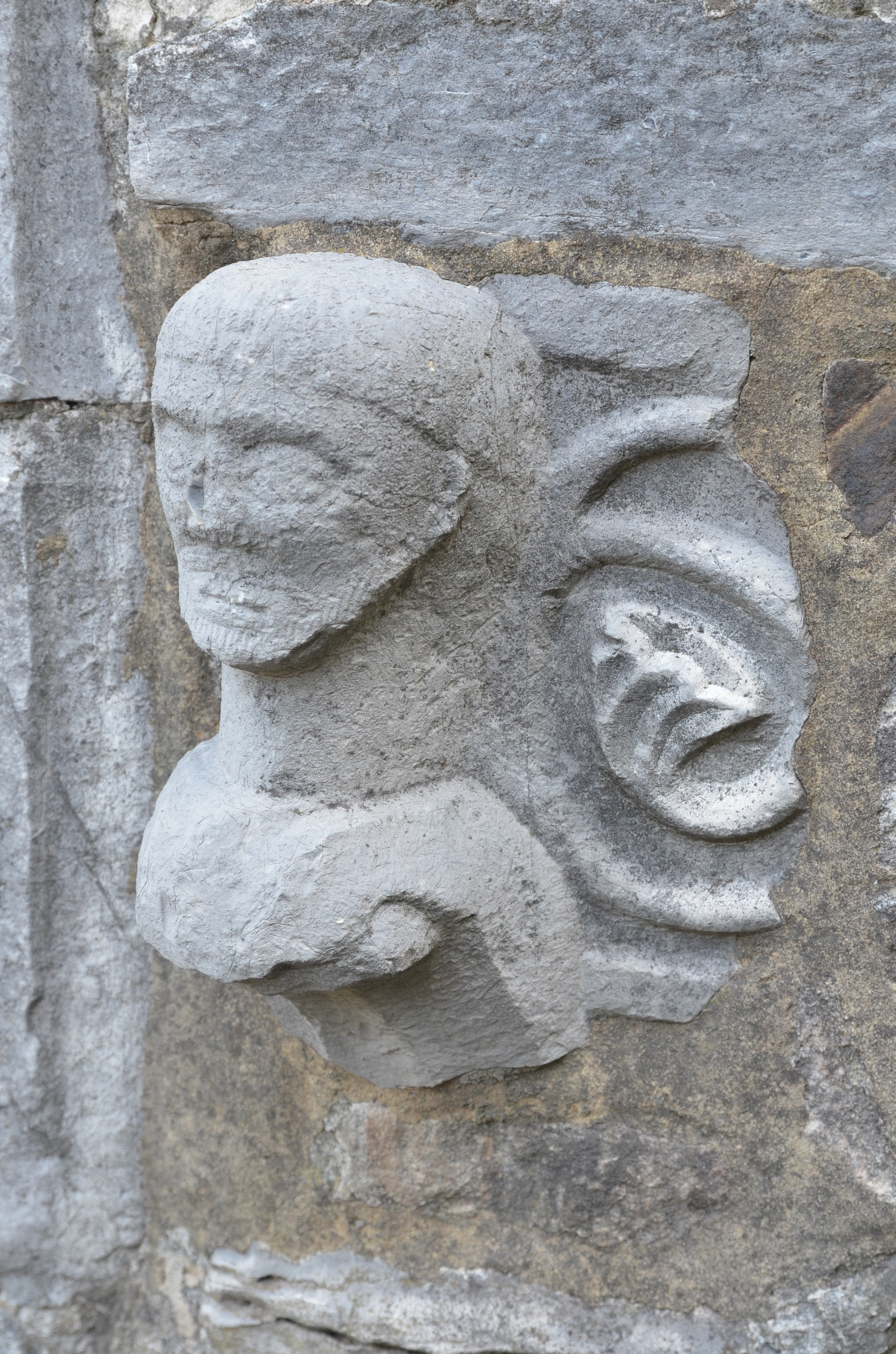 Marcinelle - (Charleroi-Belgique) - Église Saint-Martin. Fichée dans le mur extérieur du bas-côté sud, cette tête sculptée provient des fonts baptismaux du XIIIe siècle, aujourd'hui perdus.